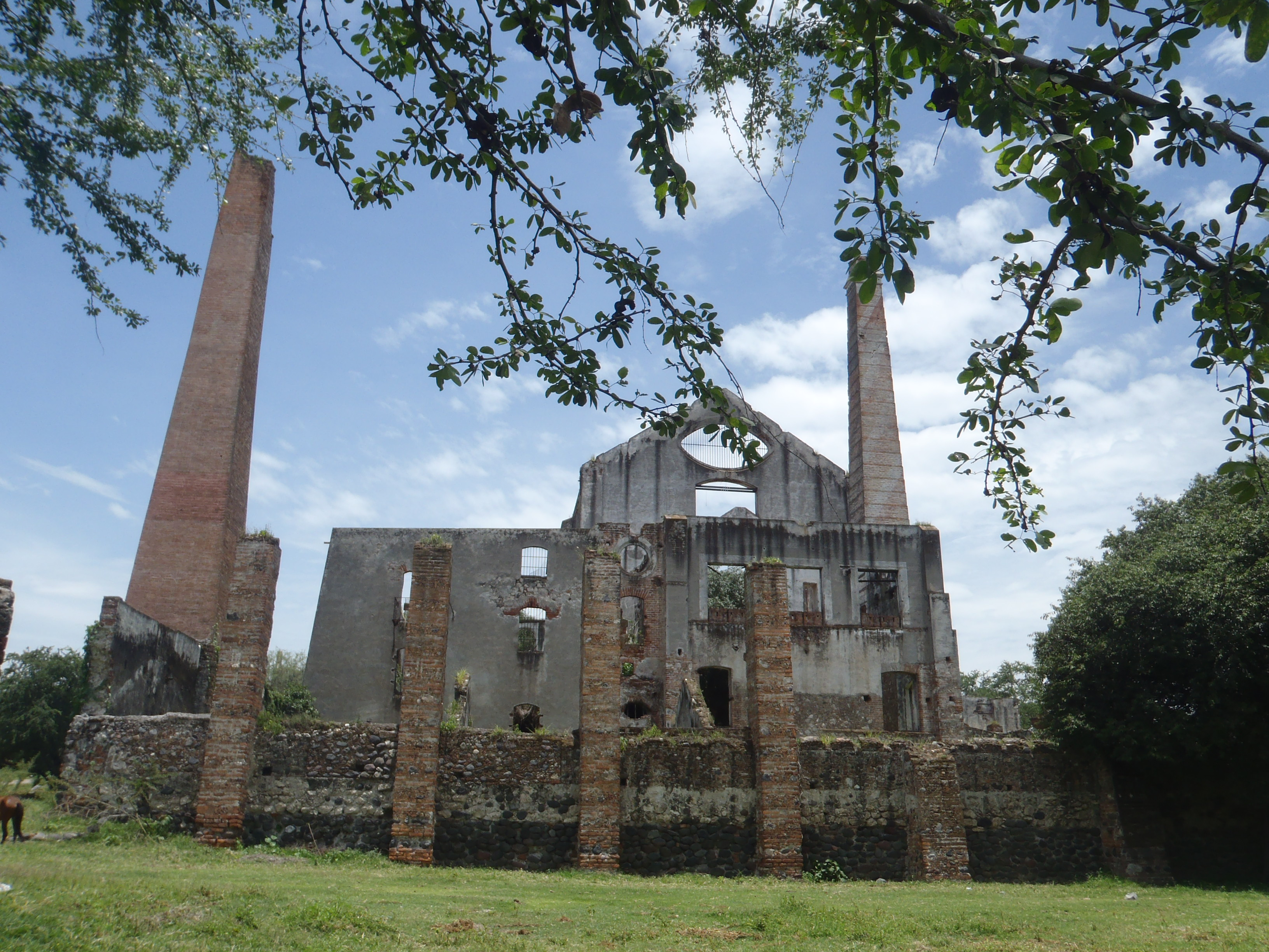 La ex hacienda Coahuixtla, ubicada en San Pedro Apatlaco, fue construida 1587 por frailes Dominicos, ha sido botín de revolucionarios, así como lugar de combate del general Zapata.